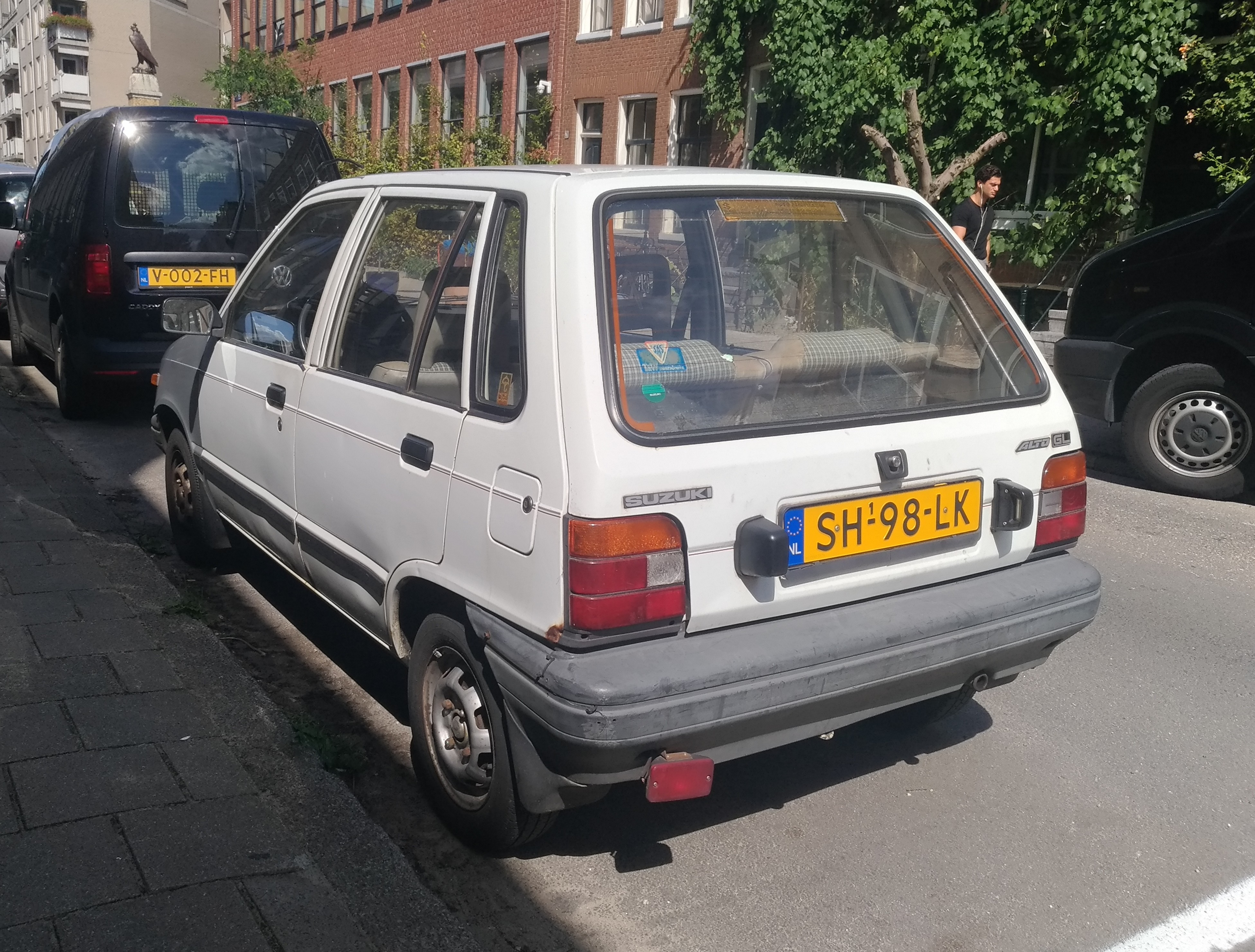 Suzuki Alto